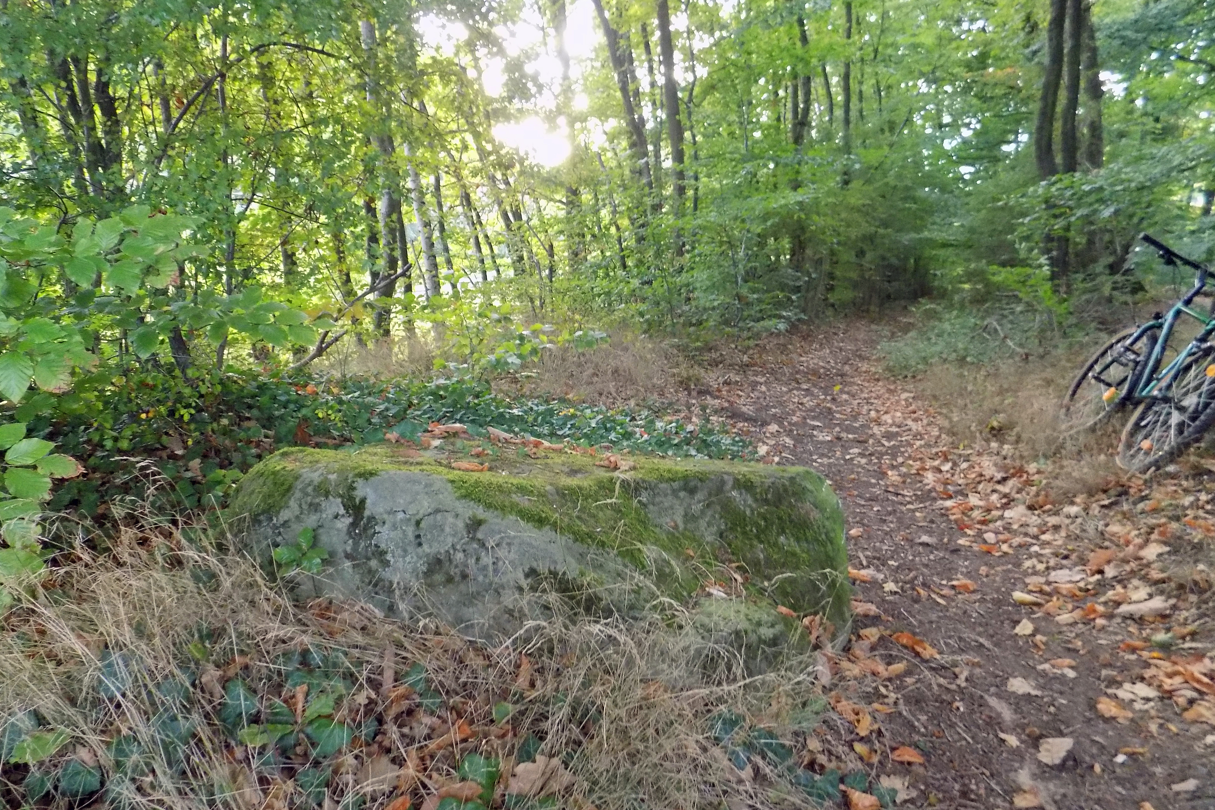 Bloc de grès taillé d'origine gallo-romaine.L'archéologue Émile Linckenheld (1880-1976) relate la découverte en 1880 de fragments d'une sculpture d'un cavalier lors de la construction d'une voie de chemin de fer. L'emplacement exact de la découverte se situe entre Carling et les premiers chemins conduisant à la forêt domaniale de Rondheidgen (à l'extrémité du chemin du Nord et à l'entrée de la forêt). Émile Linckenheld rapporte que la tête de cheval de cet ensemble sculpté fut conservée par le Dr. Laubenheimer de Metz, maître d'œuvre du Conseil d'inspection de fonctionnement des chemins de fer d'Alsace-Lorraine (la Reichseisenbahn in Elsass-Lothringen). Le monument était constitué par une colonne surmontée d'un cavalier porté, lui et sa monture, par un monstre Anguipède, de type "colonne de Merten (Moselle)". L'ensemble représentait selon Émile Linckenheld, le dieu solaire ou le dieu celtique de la foudre Taranis à cheval, assimilé à Jupiter. Il nomme cet ensemble sculpté Cavalier au Géant et rapproche cette découverte à d'autres monuments similaires connus dans la région. Il précise que "...ces monuments ont presque toujours été trouvés dans des ruines de "fermes gallo-romaines", ce qui témoigne d'une occupation très antique du lieu. Ce bloc semble constituer le socle carré de l'ensemble sculpté formé par le cavalier.